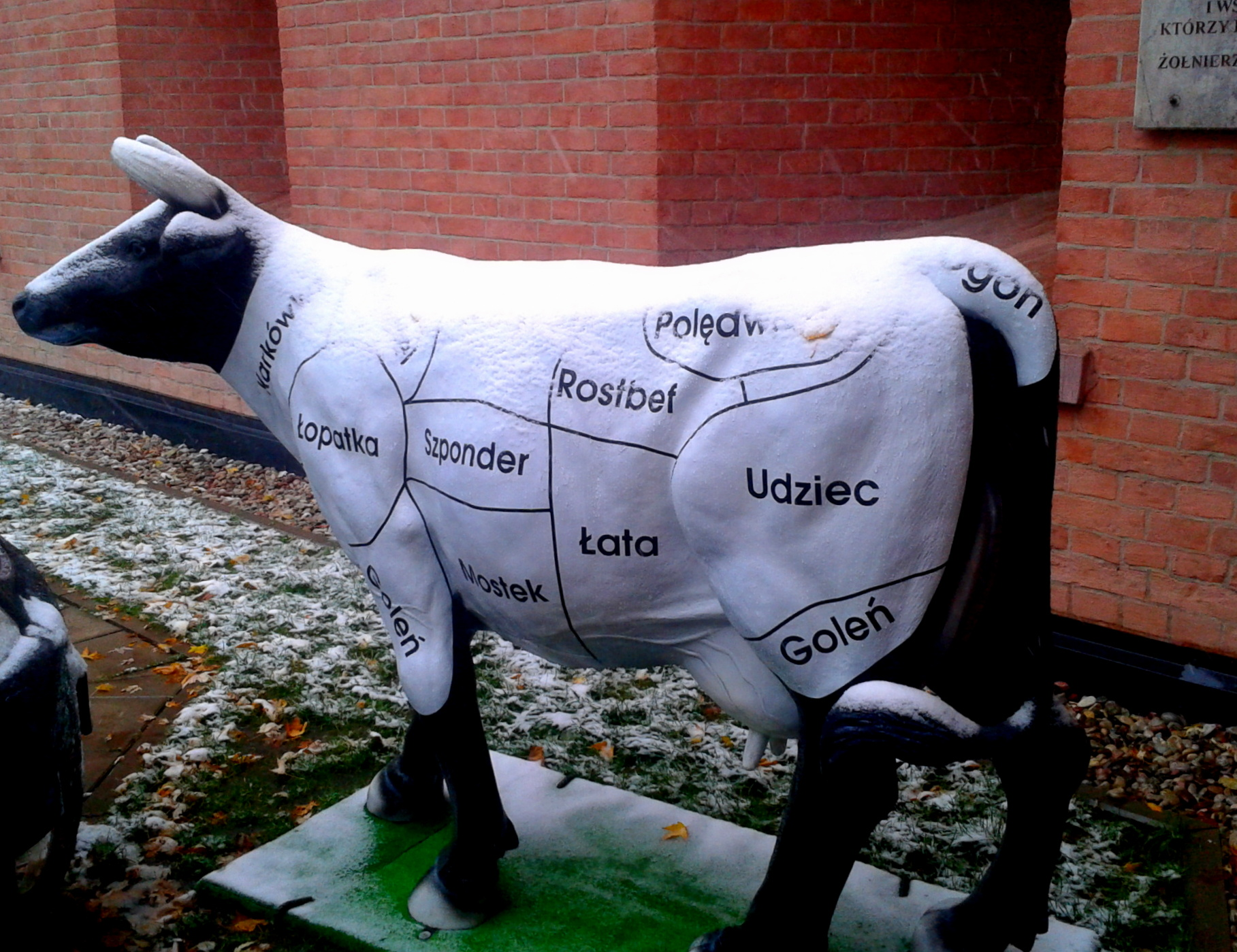 figura przedstawiająca podział wołowiny - Warszawa Żoliborz